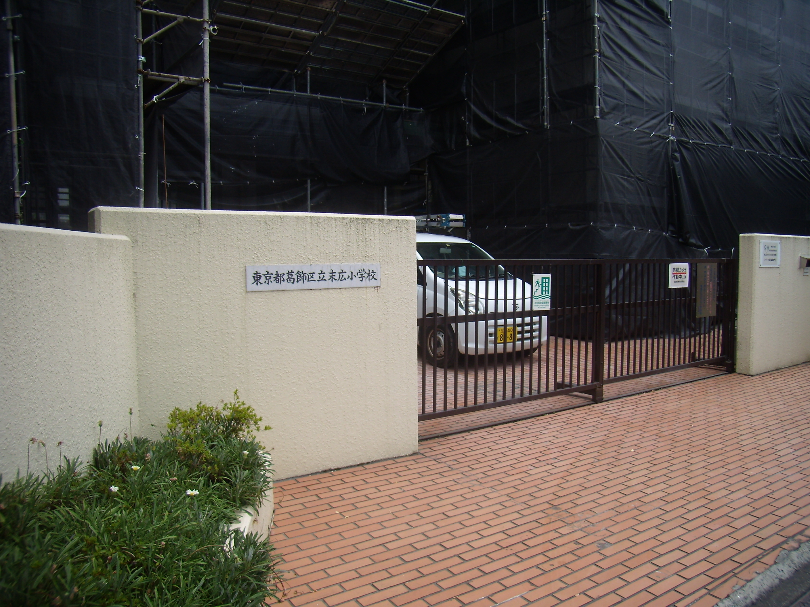 葛飾区立末広小学校の正門（撮影時（2020/8/18）、校舎外壁工事中）